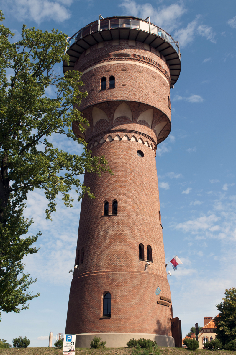 Giżycko, wodociągowa wieża ciśnień, 1901